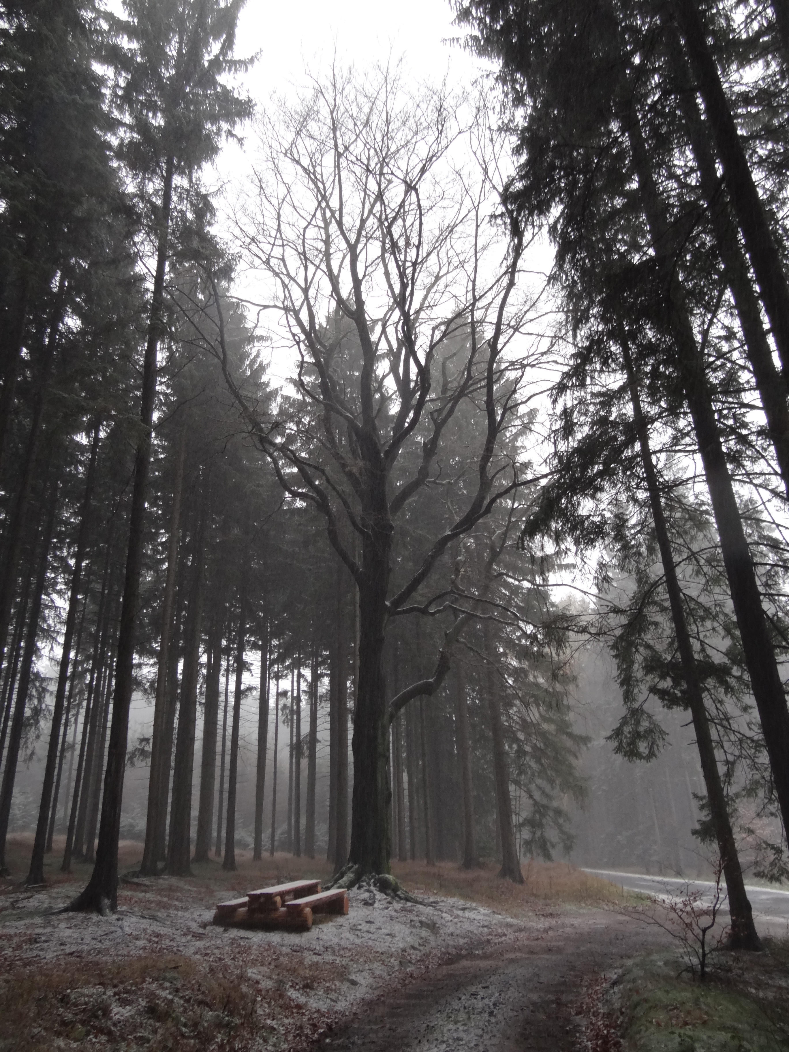 Památný Oslí buk v lese na Jindřichovickém hřebeni, mezi Novým Městem pod Smrkem a Dětřichovcem